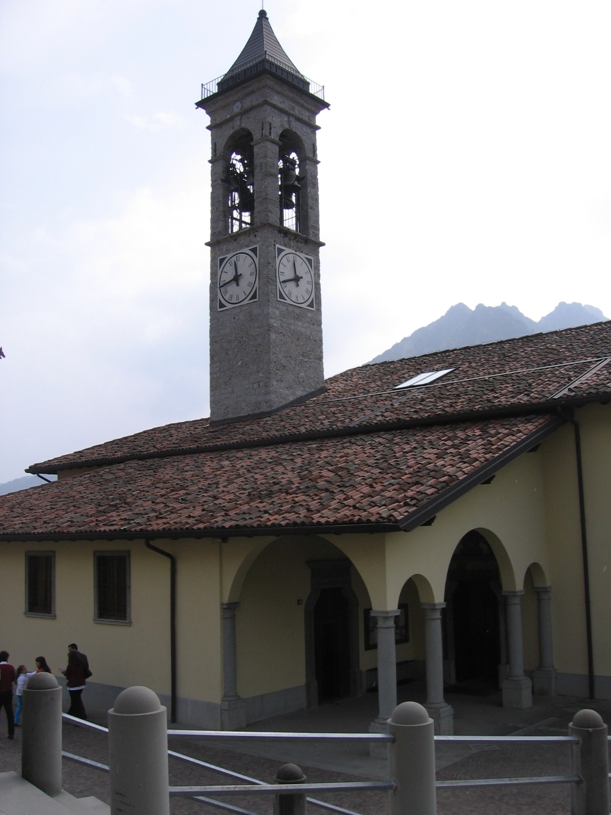 Premolo, Bergamo, Italia